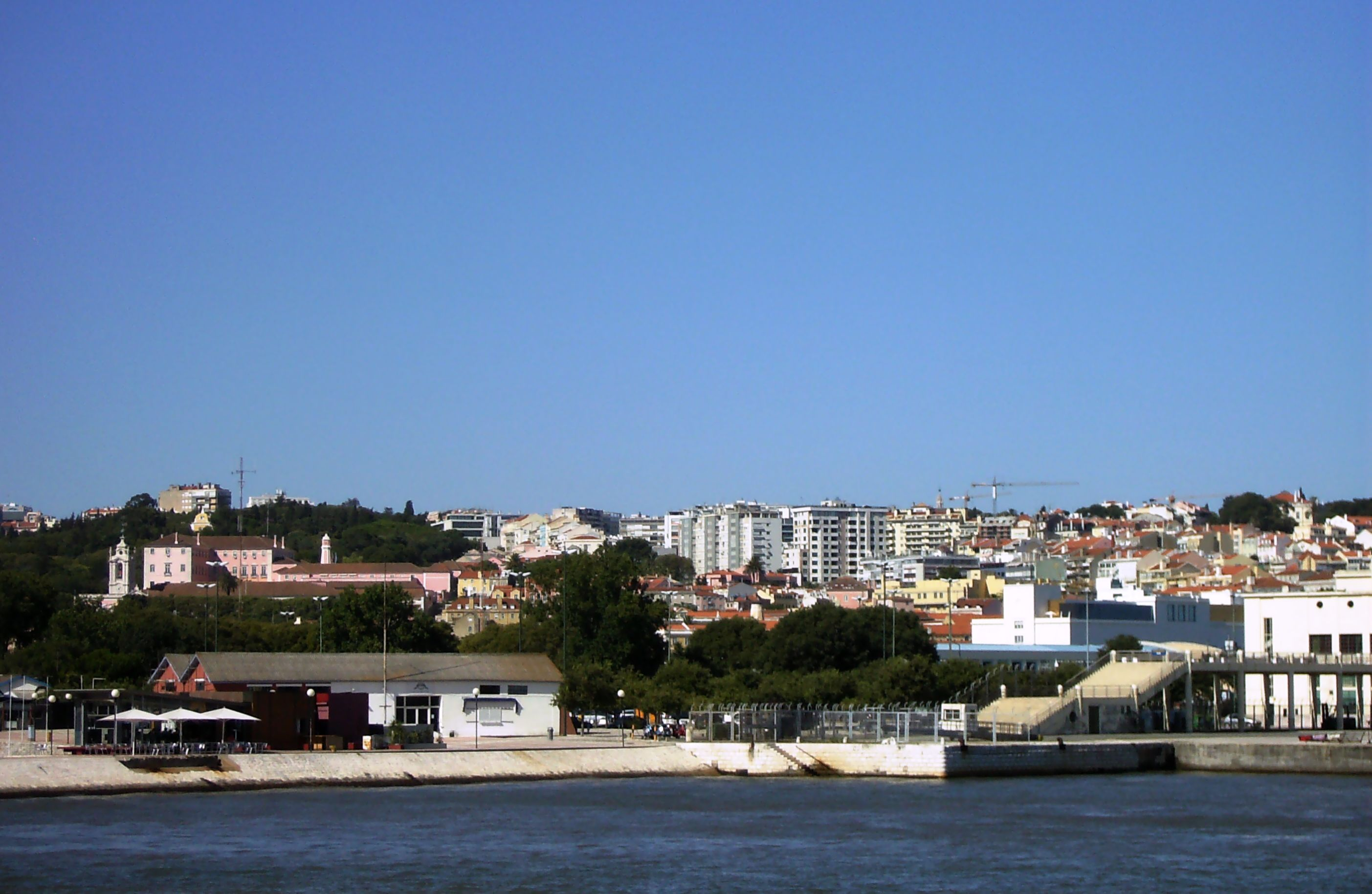 Palácio das Necessidades (Ministério dos Negócios Estrangeiros), Lisboa, Portugal: vista a partir do rio Tejo.